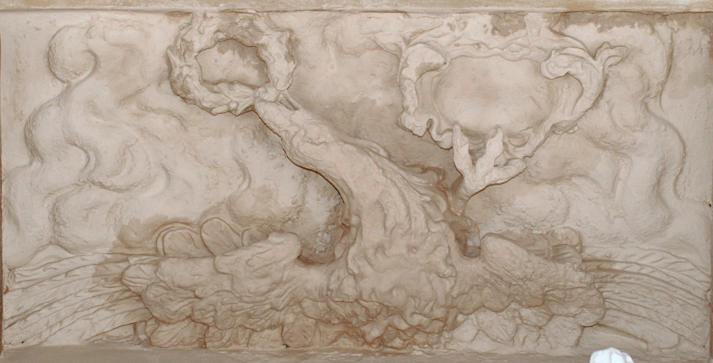 Belgique - Bruxelles - Maison de l'Agneau Blanc (rue du Marché aux Herbes 42 - baroque)